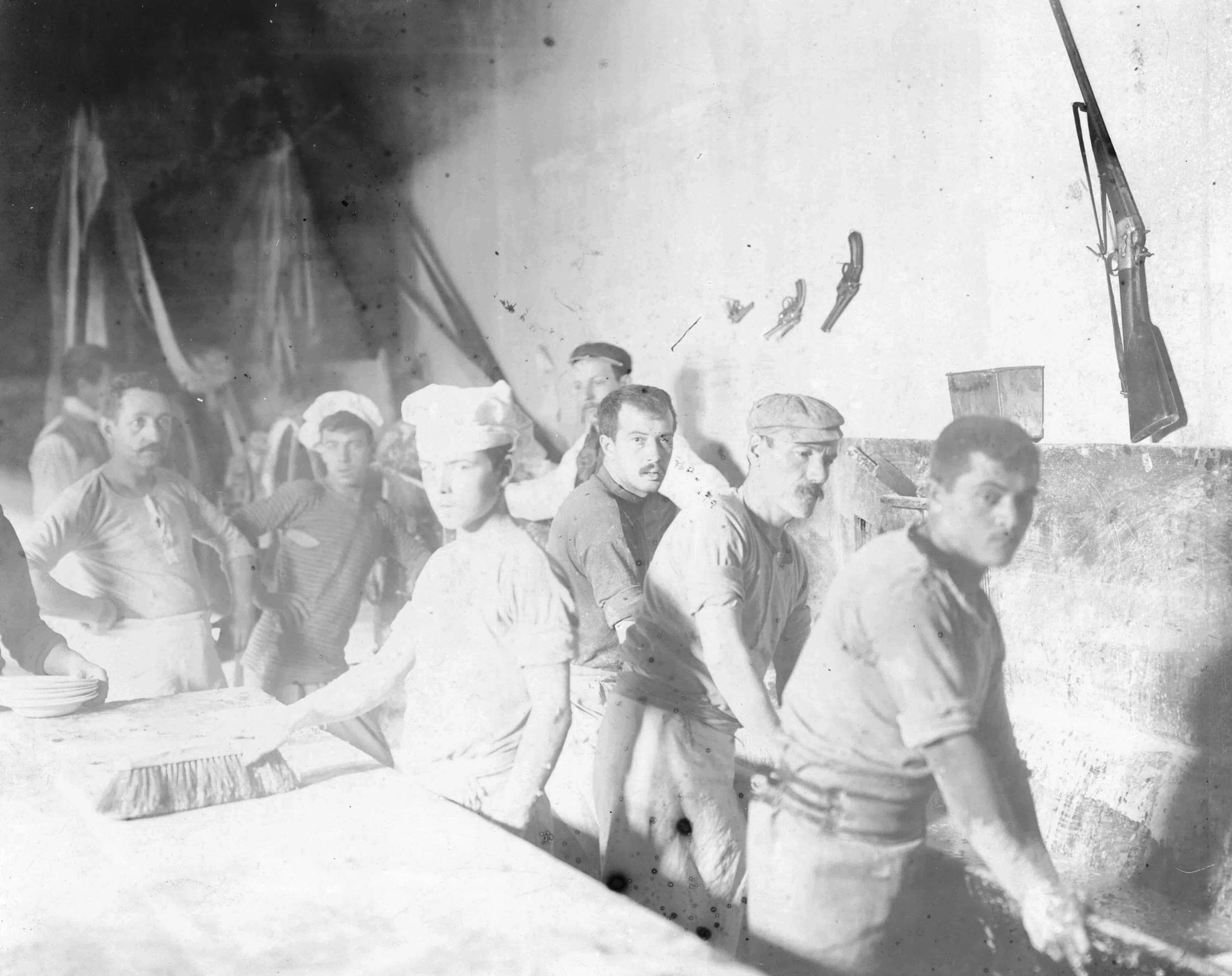 Buenos Aires. Huelga de Panaderos. Los dueños de la panadería fabricando pan, 1902. Documento fotográfico. Inventario 21878. Archivo General de la Nación Argentina